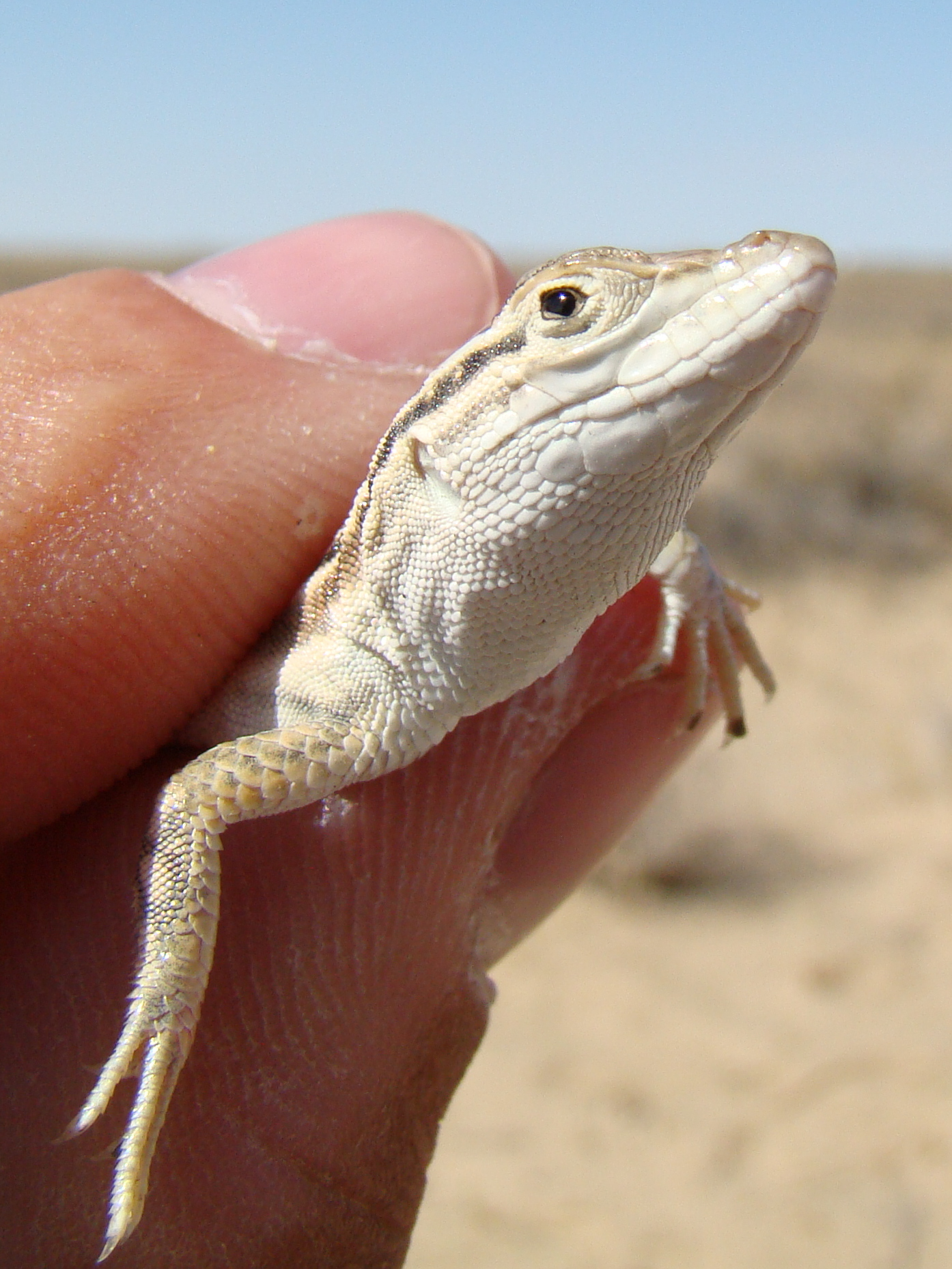 Линейчатая ящурка (Eremias lineolata). Окрестности города Байконур, левый берег Сырдарьи.